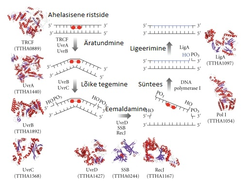 Uvr-valkude poolt teostatud nukleotiidide väljalõikereparatsioon (ekstsisioonreparatsioon).